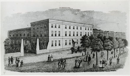 t